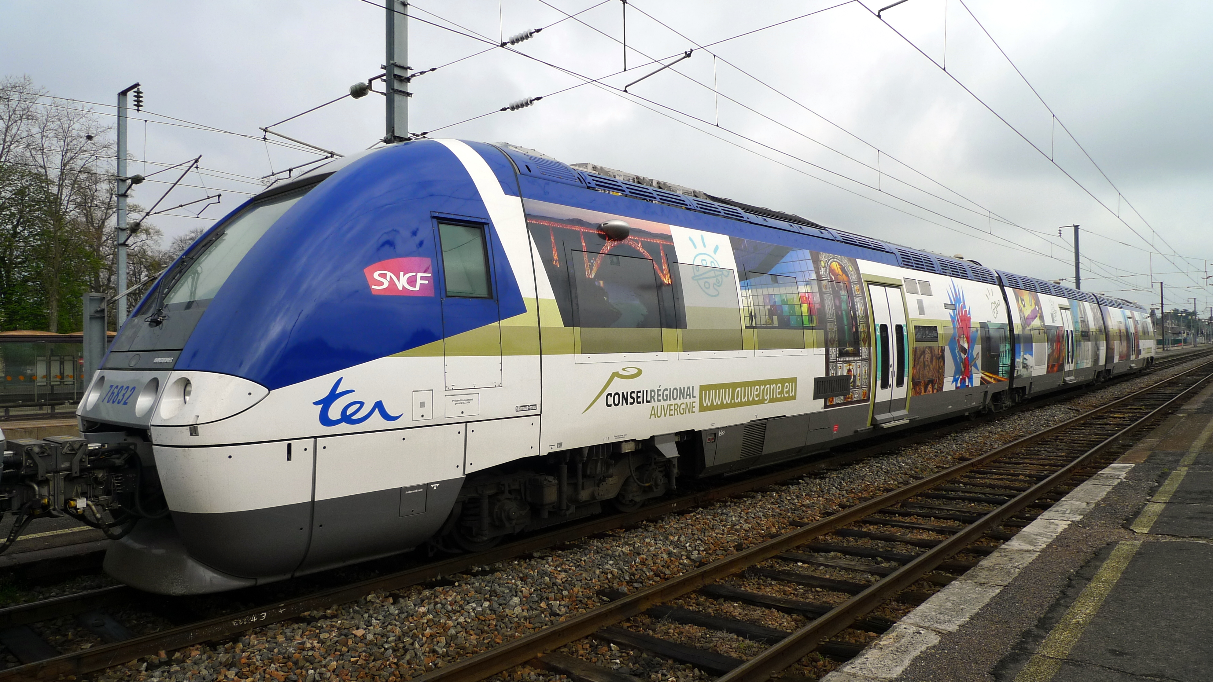 X 7650 SNCF aux couleurs TER Auvergne